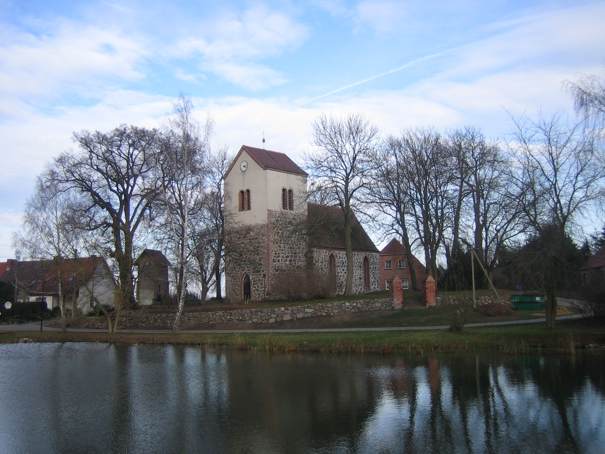 Dorfkirche Ballwitz, eingemeindeter Ortsteil der Gemeinde Holldorf, Landkreis Mecklenburgische Seenplatte